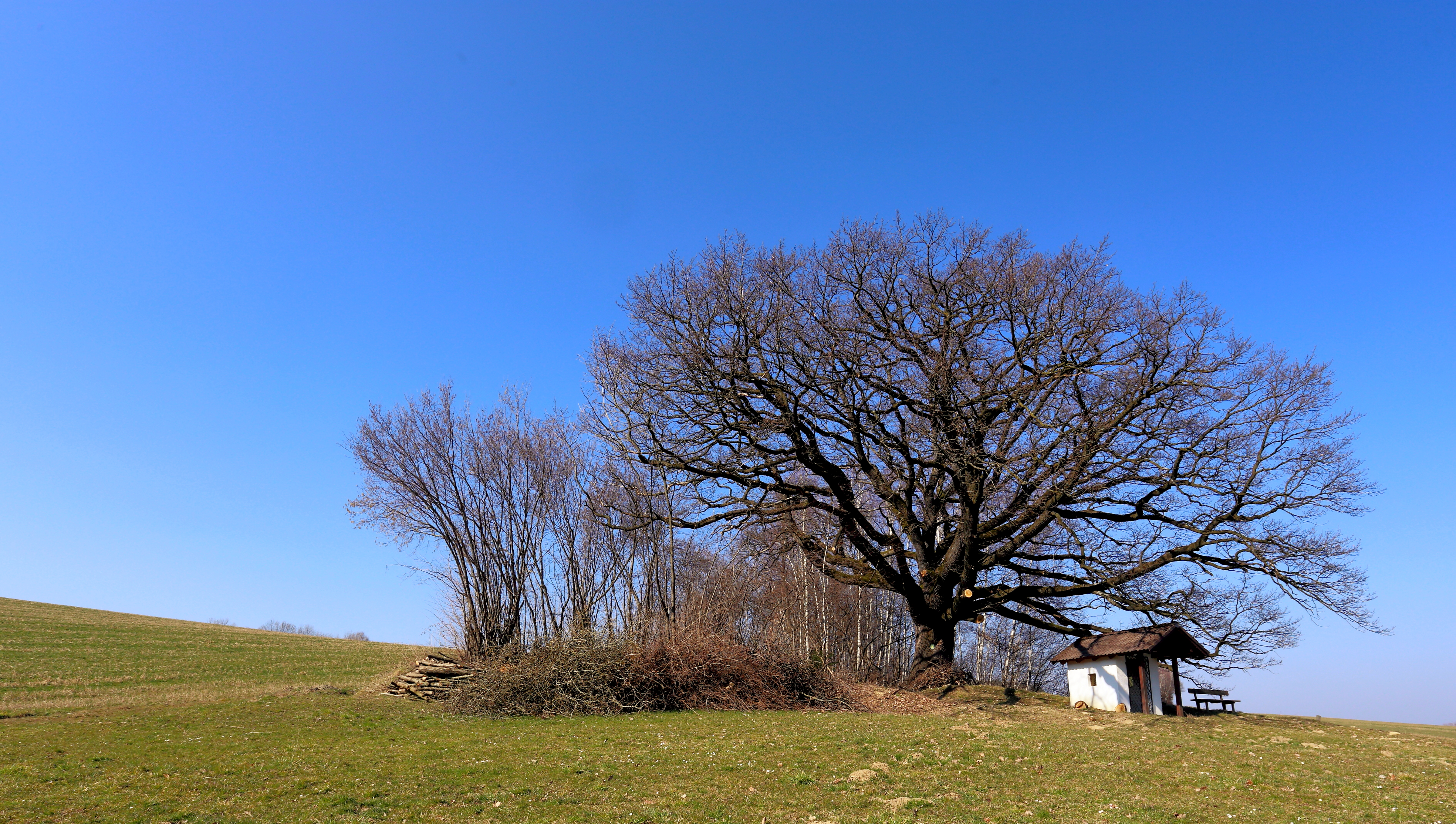 Unter Naturschutz stehende Traubeneiche in Ungerbach, ein Ortsteil der niederösterreichischen Stadt Kirchschlag in der Buckligen Welt. This media shows the natural monument in Lower Austria with the ID WB-098.